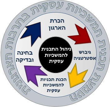 ניהול המשכיות עסקית - מעגל החיים